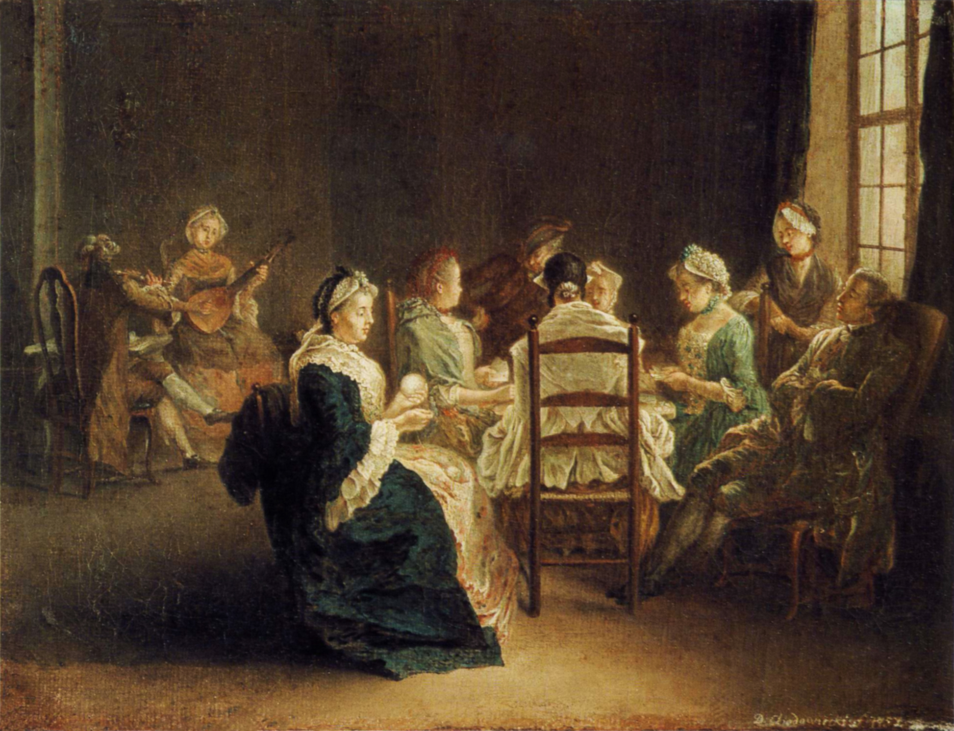 Daniel Nikolaus Chodowiecki, Gesellschaft beim Kartenspiel, 1757. Öl auf Leinwand, 18 x 23,5 cm. Stiftung Stadtmuseum Berlin.